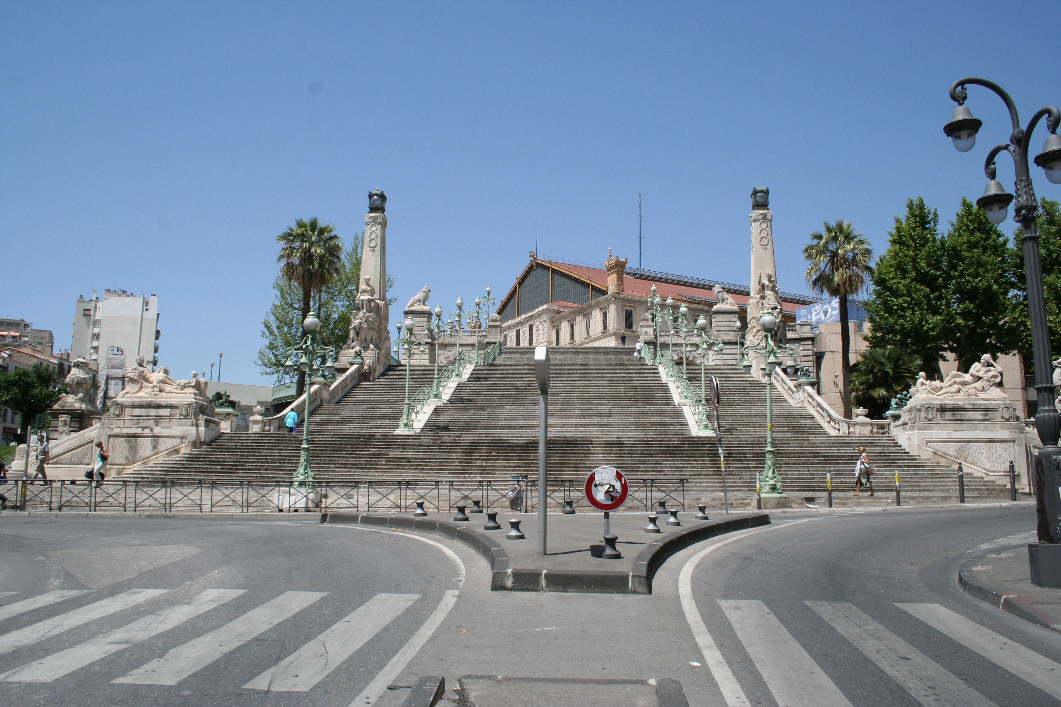 escalier monumental de la gare Marseille-Saint-Charles.